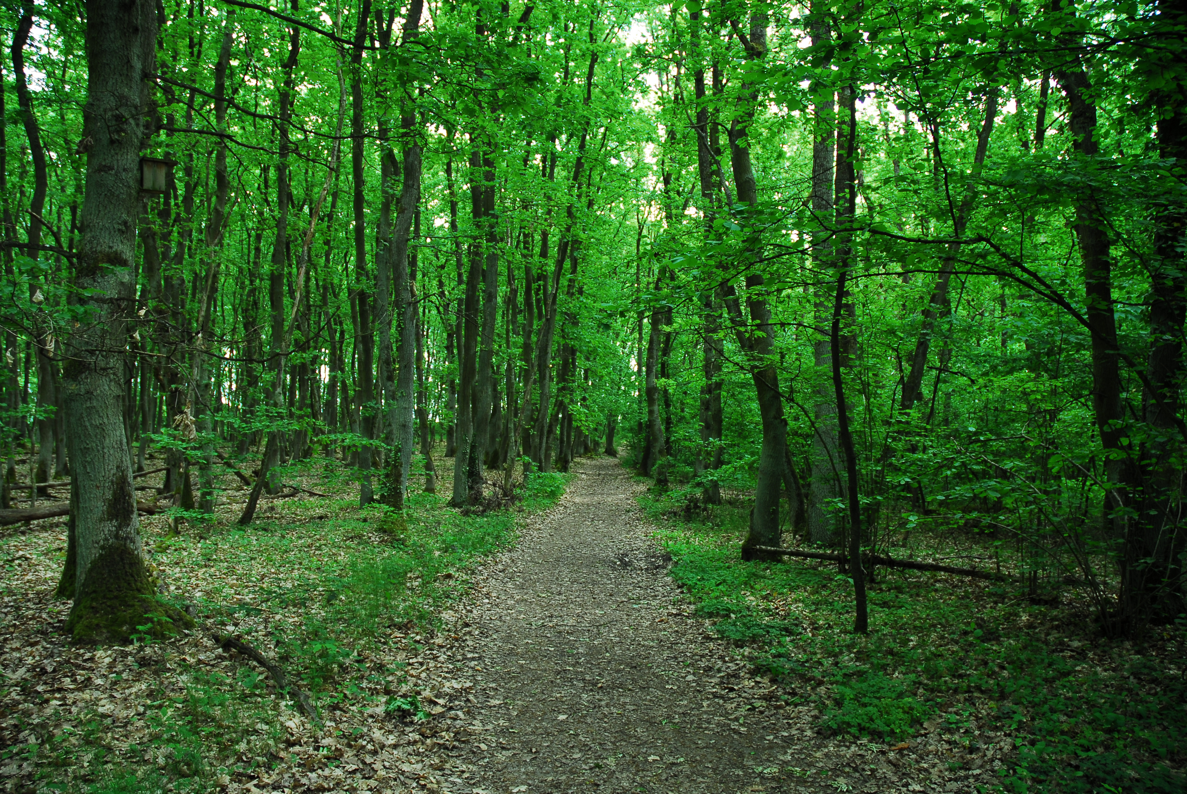 Naturschutzgebiet Gau-Algesheimer Kopf - Erweiterung (Gau-Algesheim): Eichen-Hainbuchen-Elsbeeren-Wald.